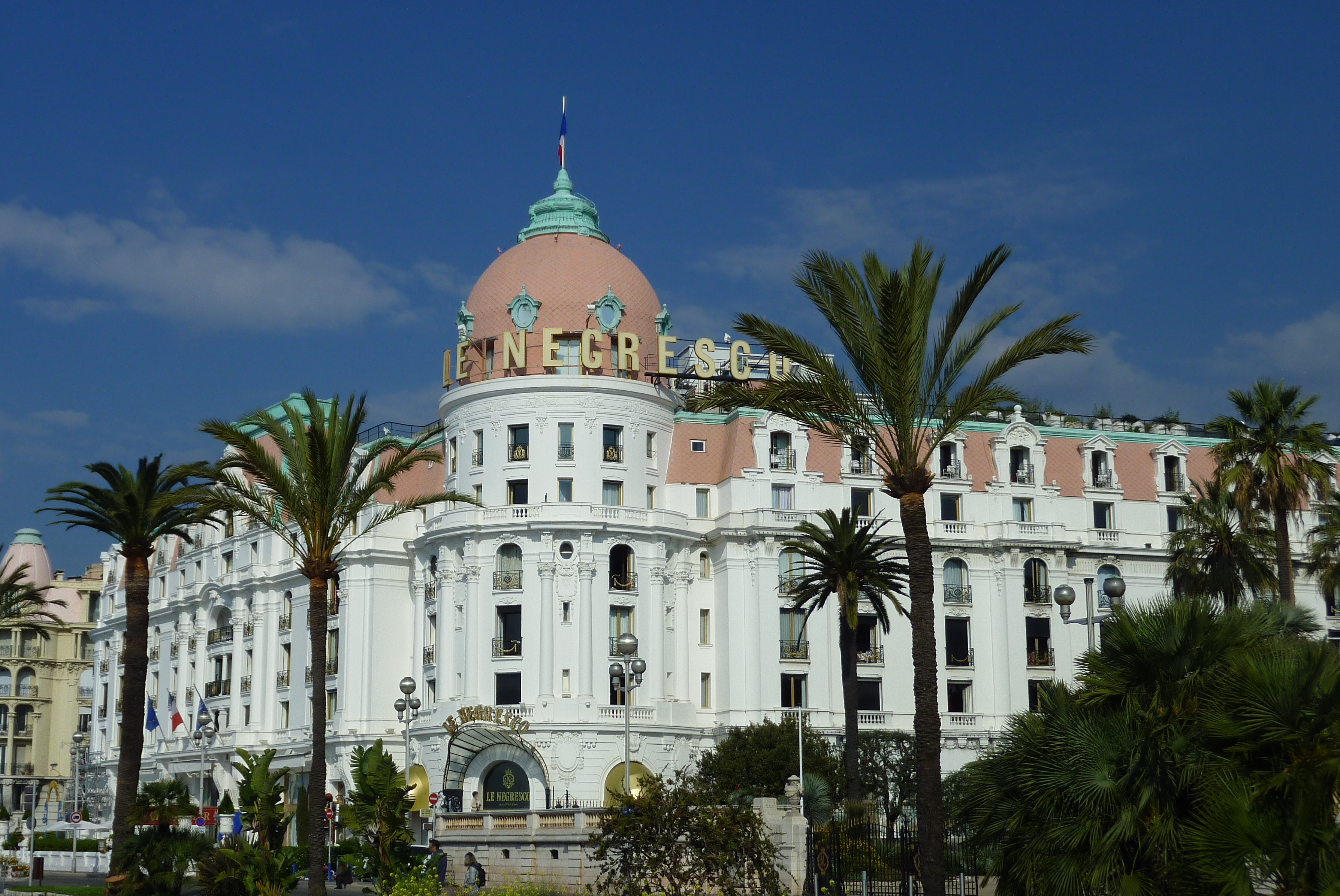 Hôtel Negresco, (Nice, Alpes-Maritimes, France) .